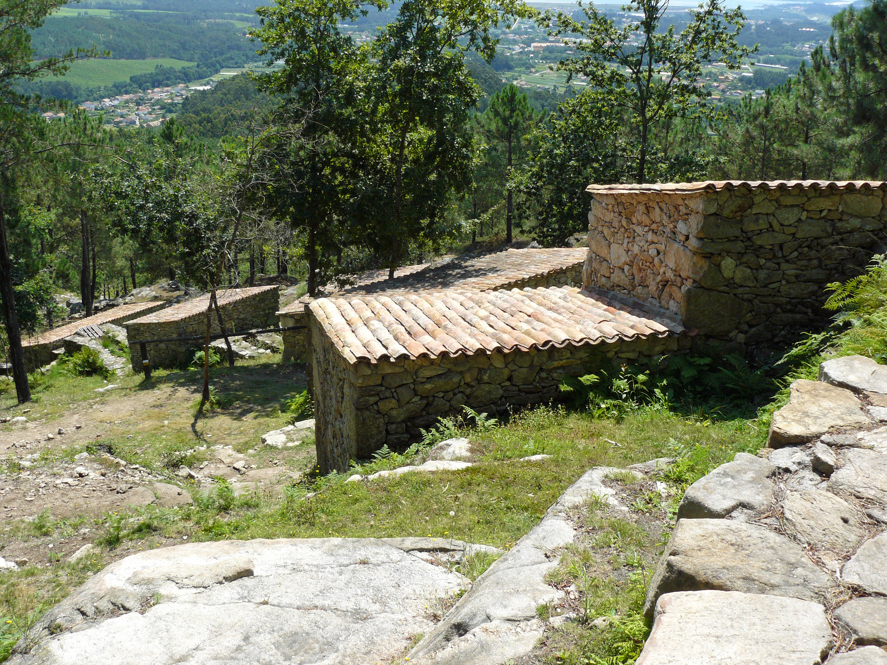 Baixada dos Muíños do Picón